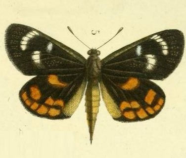 Pl.11-fig.5-Synemon parthenoides Felder, 1874